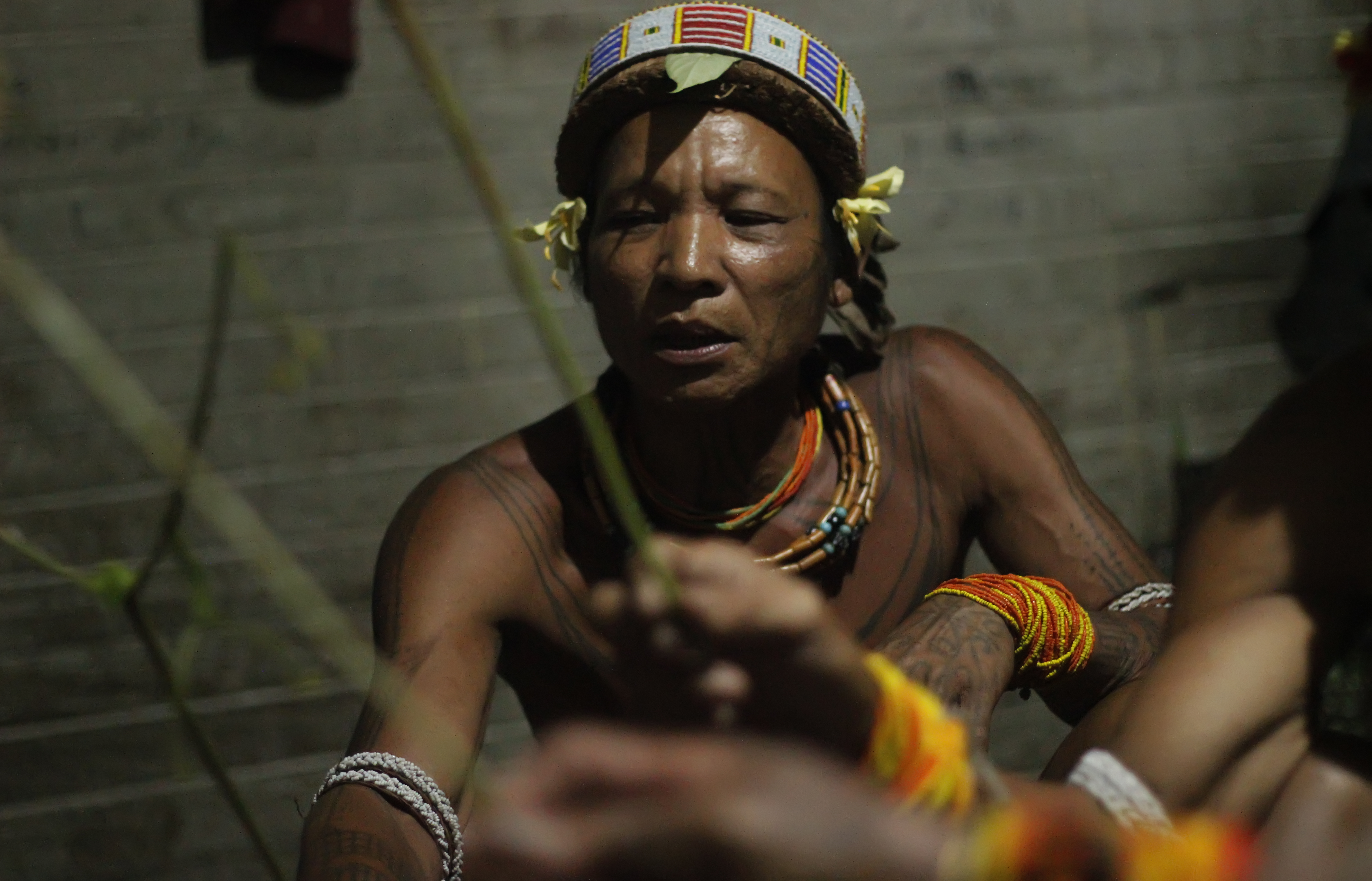 Sikerei adalah dukun atau tabib dari kepualuan mentawai yang bertugas mengobati orang yang sakit. Obat-obatan yang digunakan ialah dari tumbuh tumbuhan yang ada di lingkungan mereka.